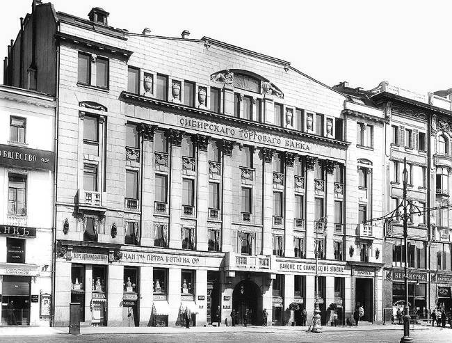 Сибирский торговый банк. Санкт-Петербург, Невский, 44. 1910-е годы